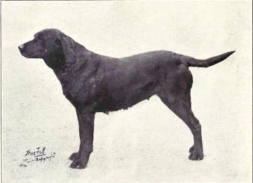 Labrador Retriever from 1915